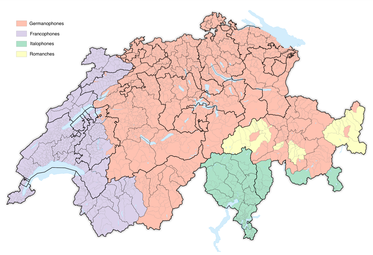 Carte linguistique de la Suisse (2014).